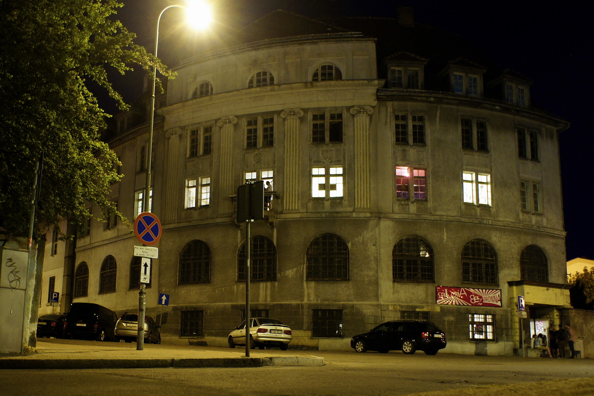 Gorzów Wielkopolski, ratusz, ob. biura, po 1920